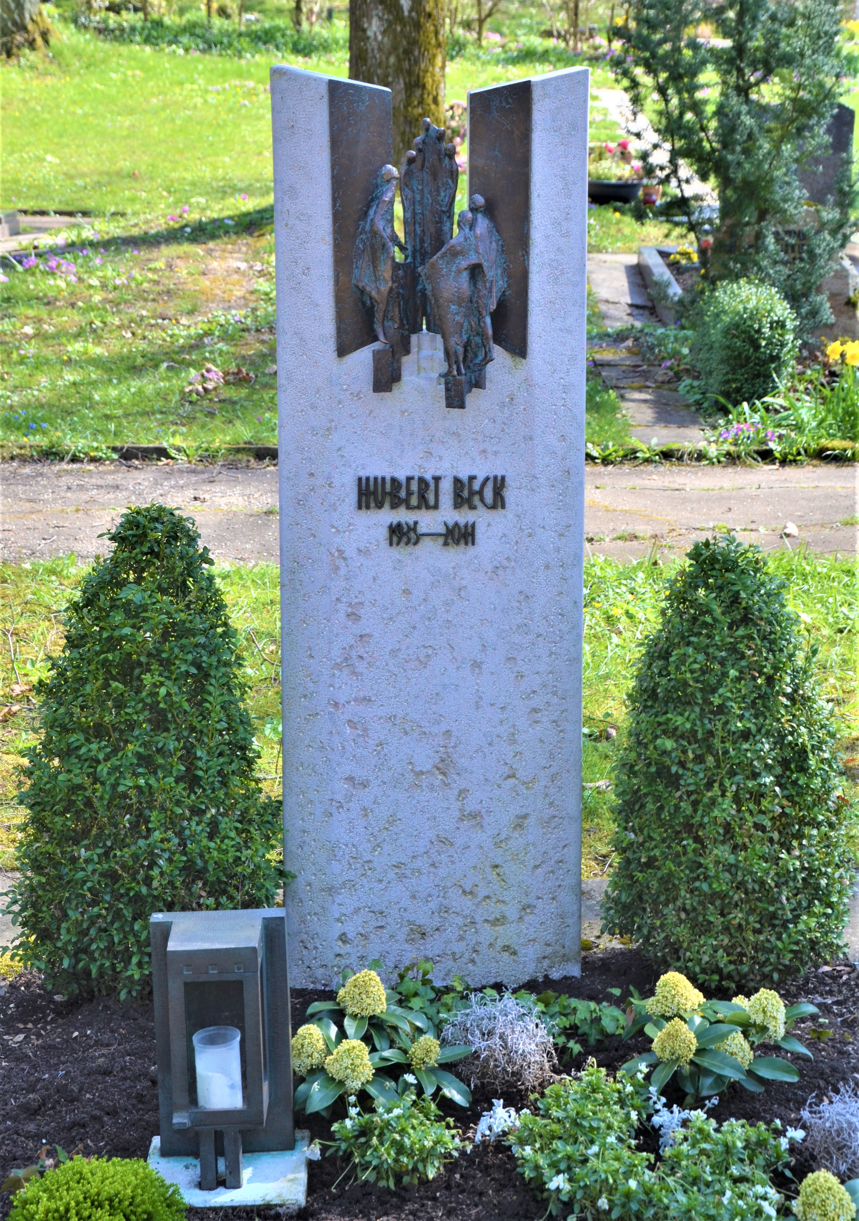 Grabmal von Kirchenmusikdirektor Hubert Beck, Münsterorganist am Gmünder Münster und Dozent an der PH Schwäbisch Gmünd, auf dem Dreifaltigkeitsfriedhof in Schwäbisch Gmünd